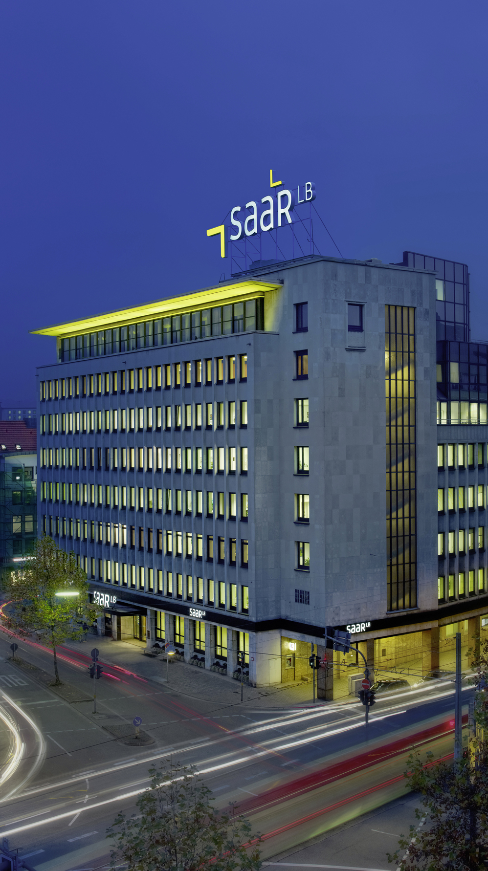 Hauptsitz Saarbrücken, Ursulinenstraße 2